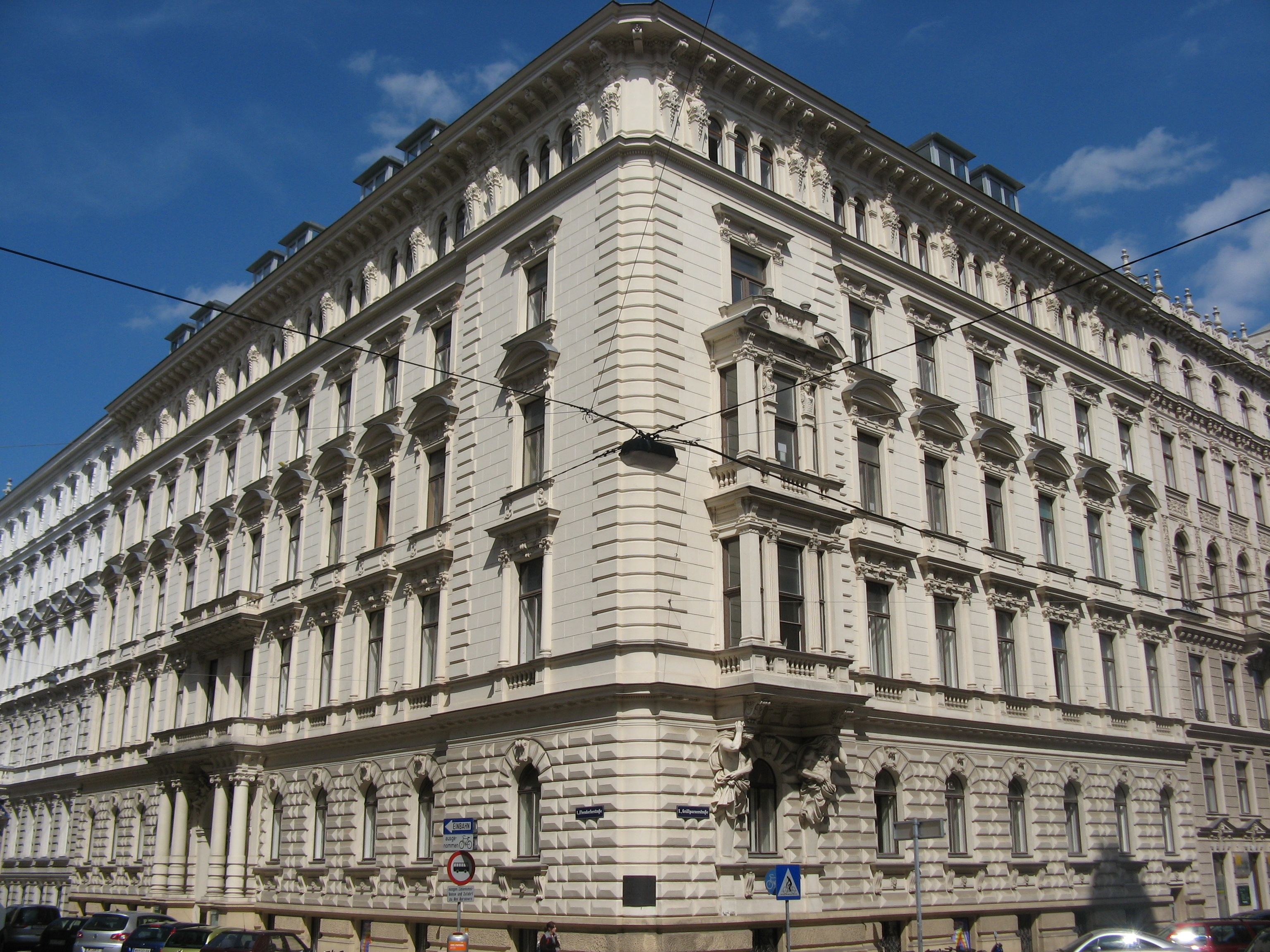 Haus (1883-84) von Wilhelm Stiassny, Ebendorferstraße 8, Wien-Innere Stadt